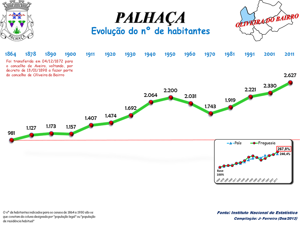 Evolução da População 1864 / 2011